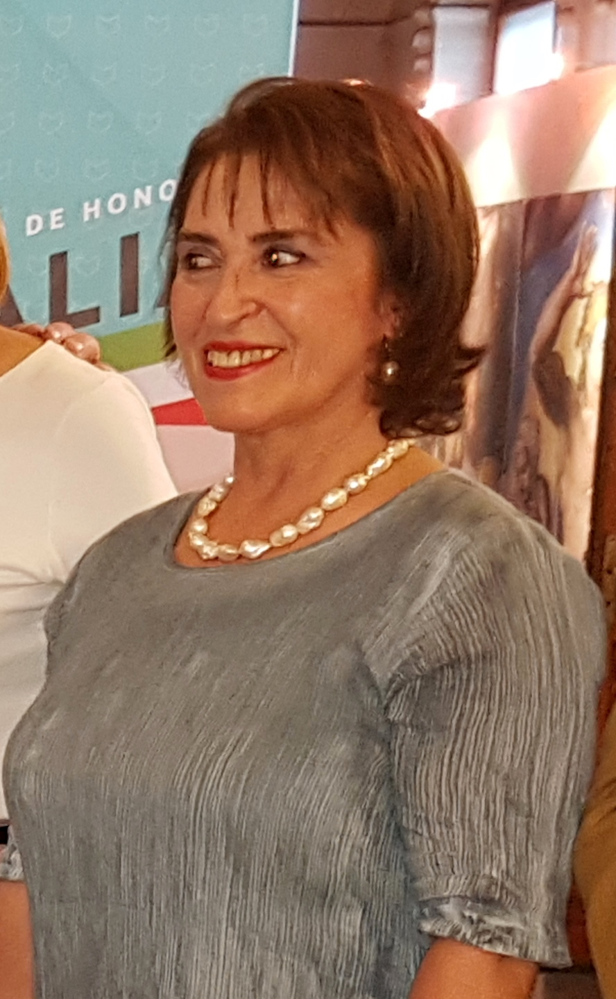 La periodista chilena Patricia Stambuk (Punta Arenas, 1951) en la Feria Internacional del Libro de Santiago 2017.